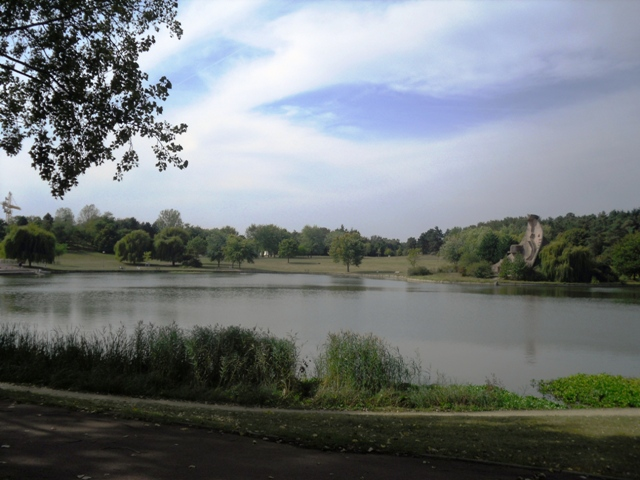 Le parc du Lac à Courcouronnes (91)